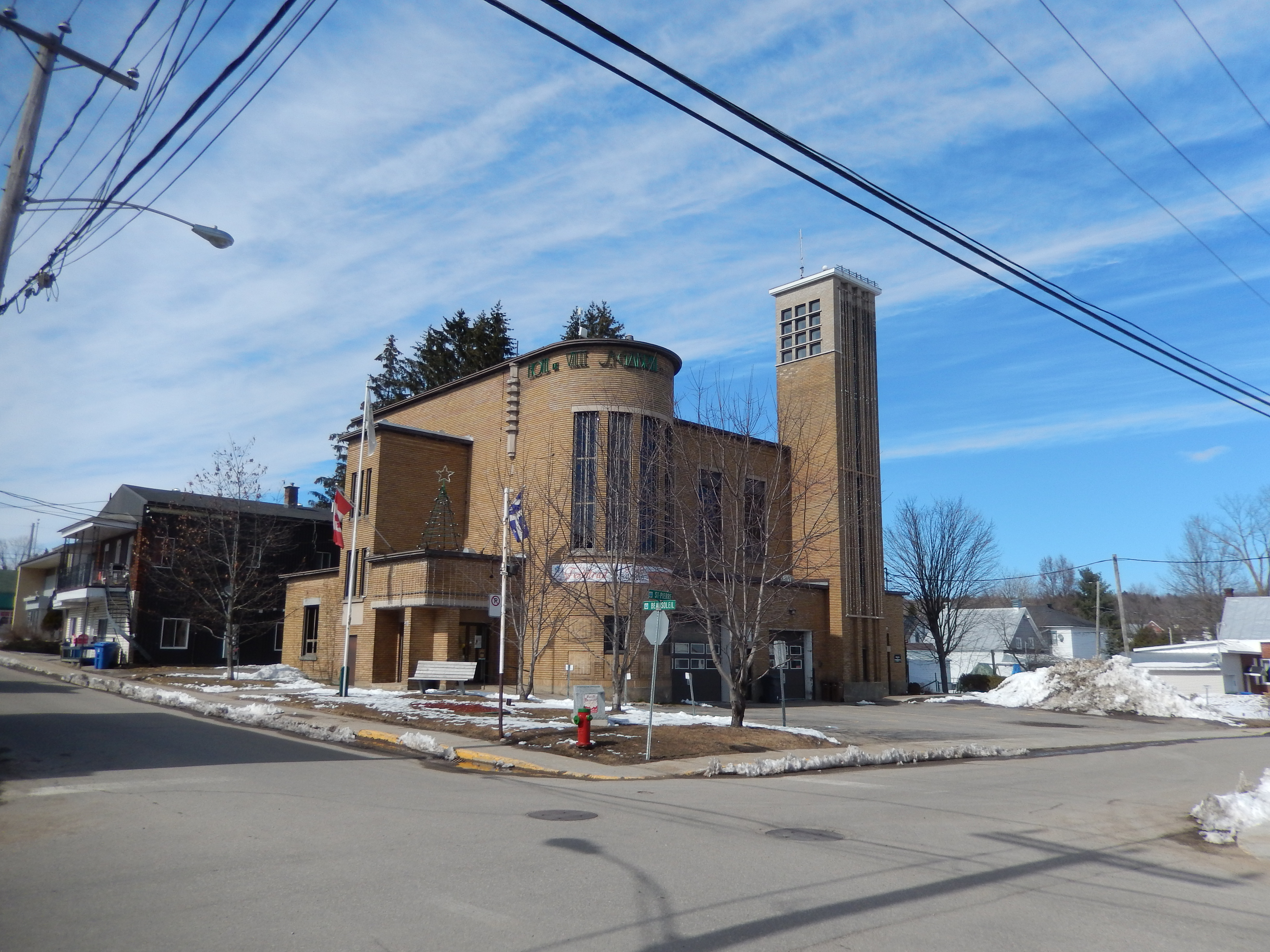 Hôtel de ville de Saint-Gabriel, avril 2016